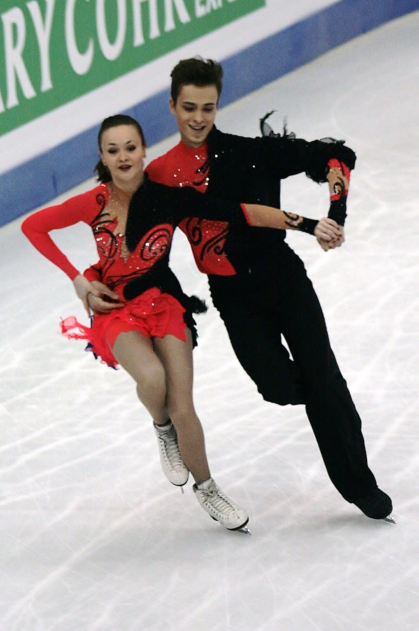 Анна Нагорнюк и Виктор Коваленко (Узбекистан) на чемпионате мира по фигурному катанию 2012.